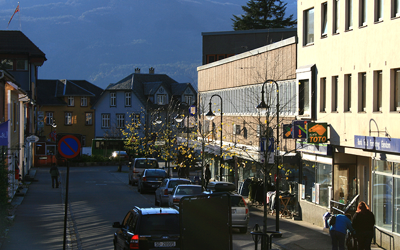 Skulegata i søndre del av Sauda sentrum.